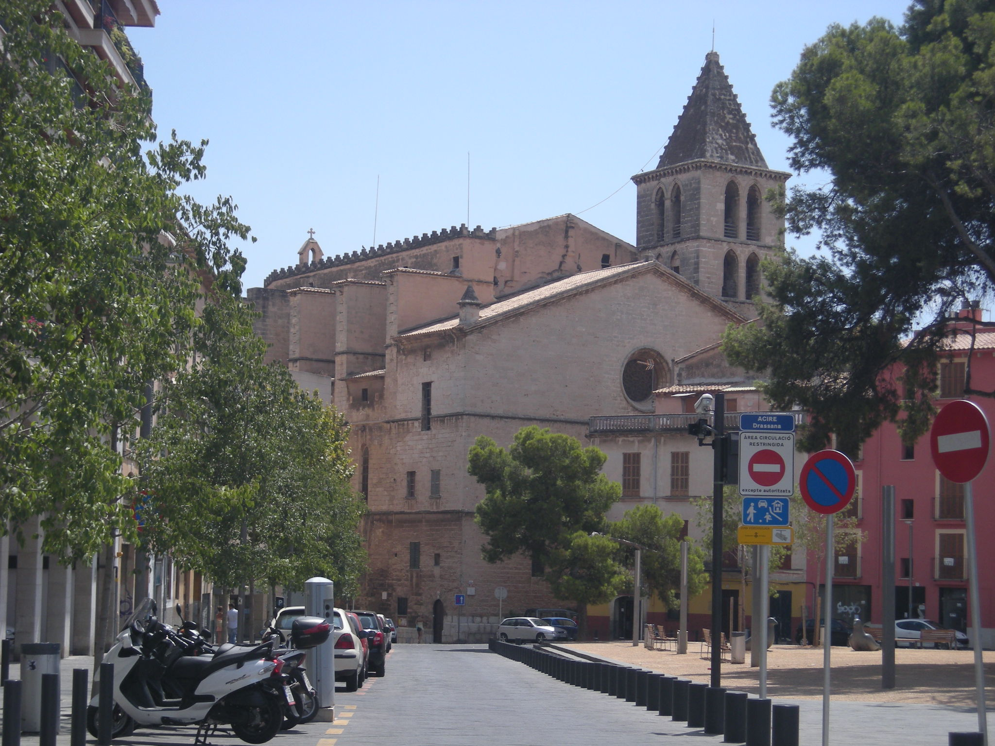 Església de Santa Creu. Palma.